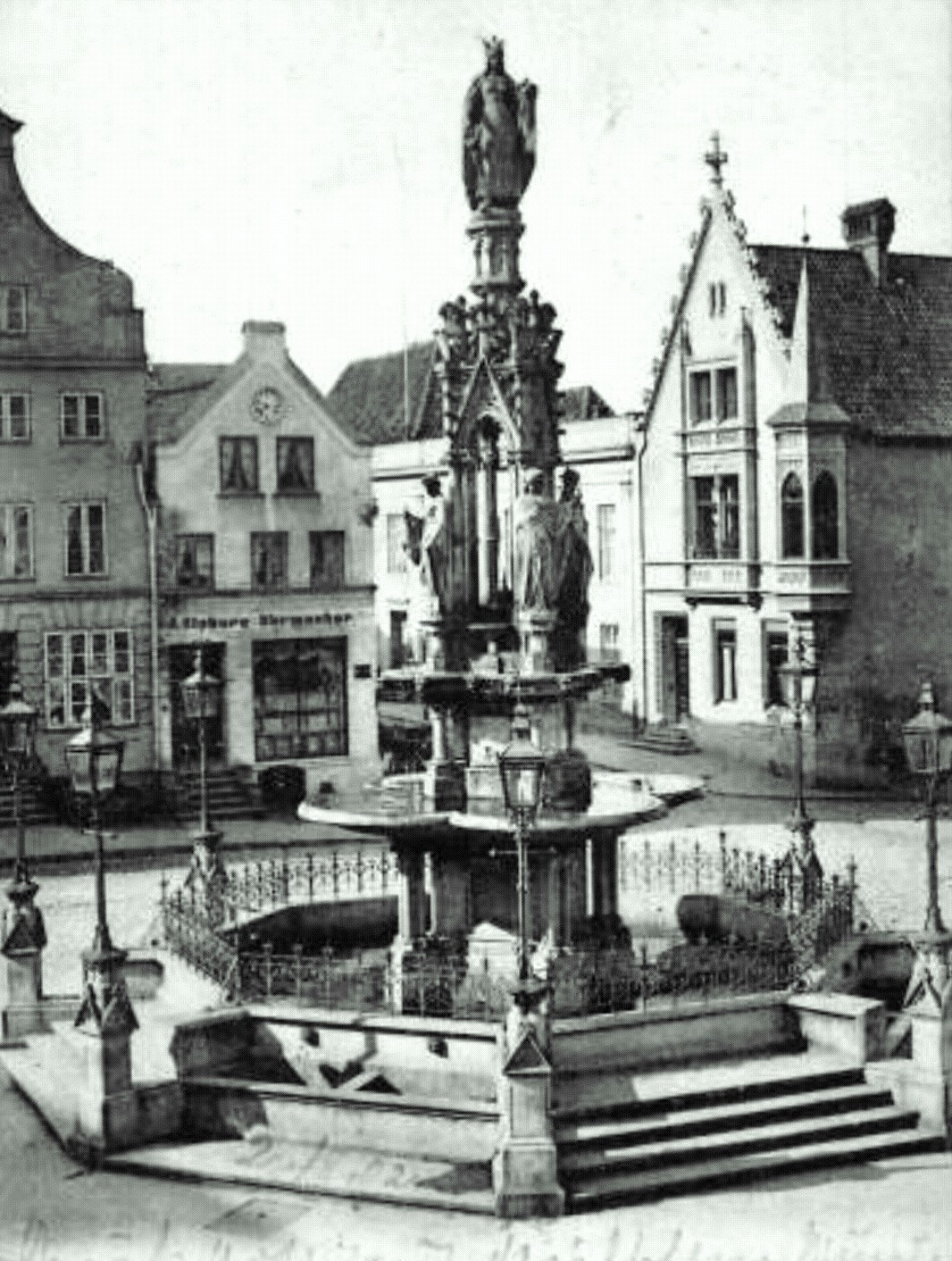 Siegesbrunnen auf dem Klingenberg in Lübeck. Errichtet 1875, abgetragen 1935